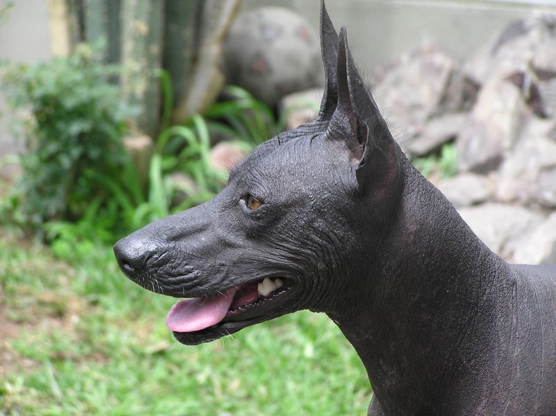 Lucrecia, face typical Peruvian Hairless Dog. Trujillo, Peru